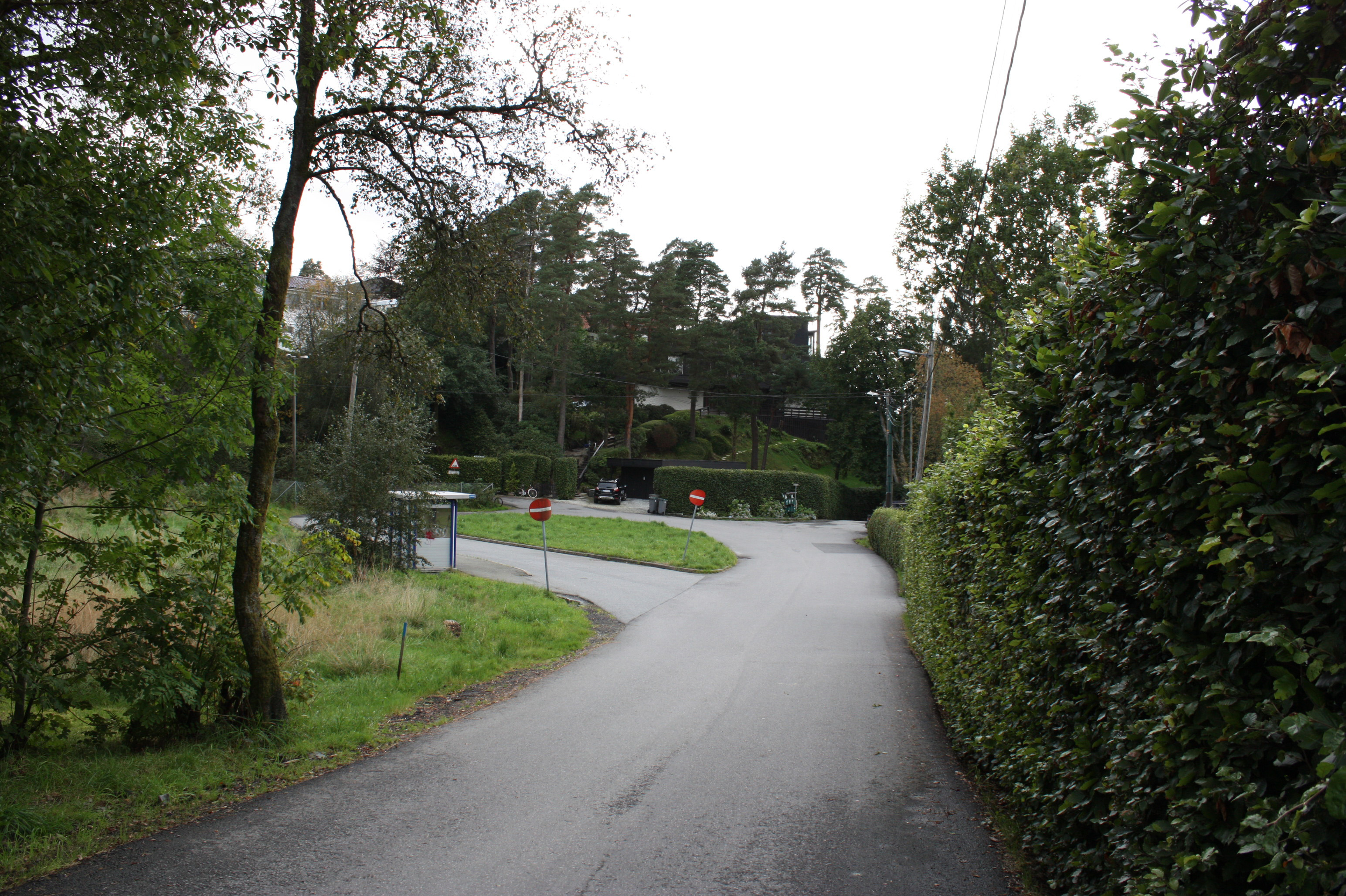 Sundtsveg, Fana, Bergen.